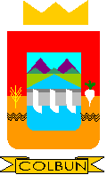 Escudo de armas de la comuna de Colbún de Chile Coat of arms of Colbún, commune of Chile